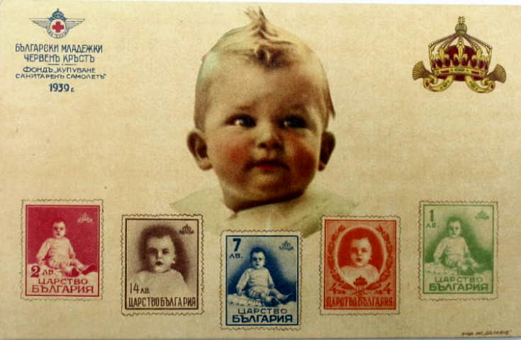 Благотворителна картичка на Българския младежки Червен кръст от 1939 г. със Симеон Сакскобургготски